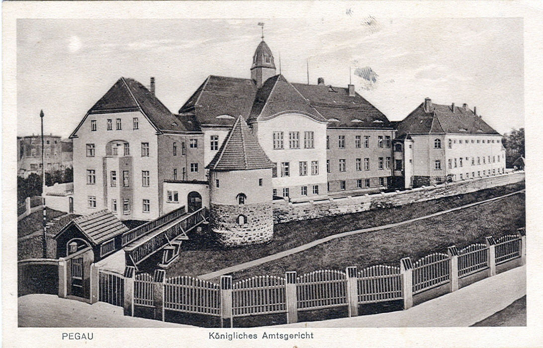 Postkarte, undatiert ( ca.1914 ). Beschriftung: "Pegau - Königliches Amtsgericht".